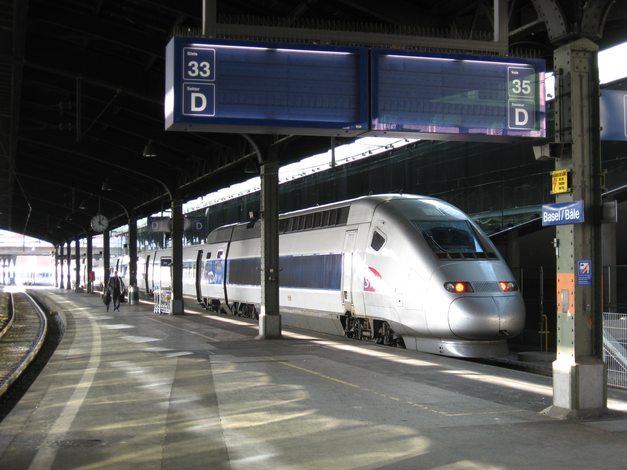 Een Franse TGV op een zijspoor van SNCF Basel station.